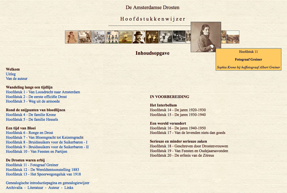 Gedeelte van een i-boek-introductiepagina. De Hoofdstukkenwijzer bevat thumbnails die, zodra men er met de muis overheen gaat, vergroot opspringen en een popup-tekst tonen met verkorte informatie over het betreffende hoofdstuk.